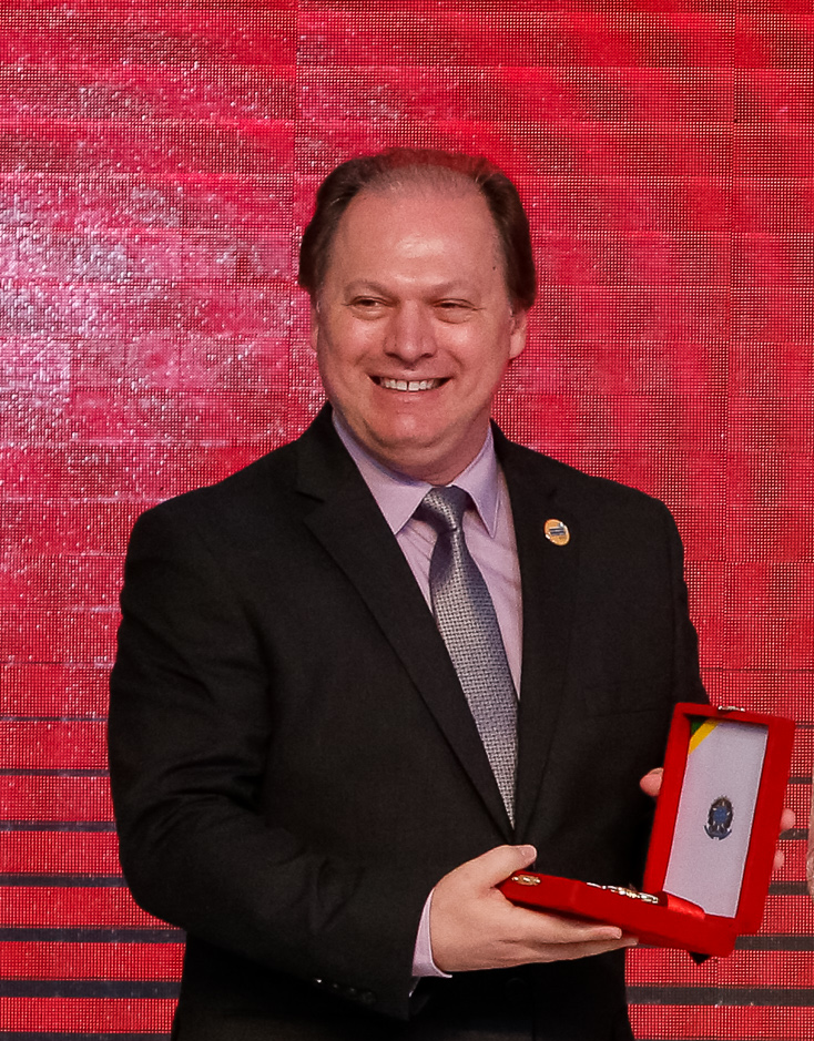 (Brasília - DF, 19/12/2017) Roberto Minczuk, recebe da Primeira Dama, Marcela Temer, a Insígnia da Ordem do Mérito Cultural no Grau de Comendador. Foto: Alan Santos/PR